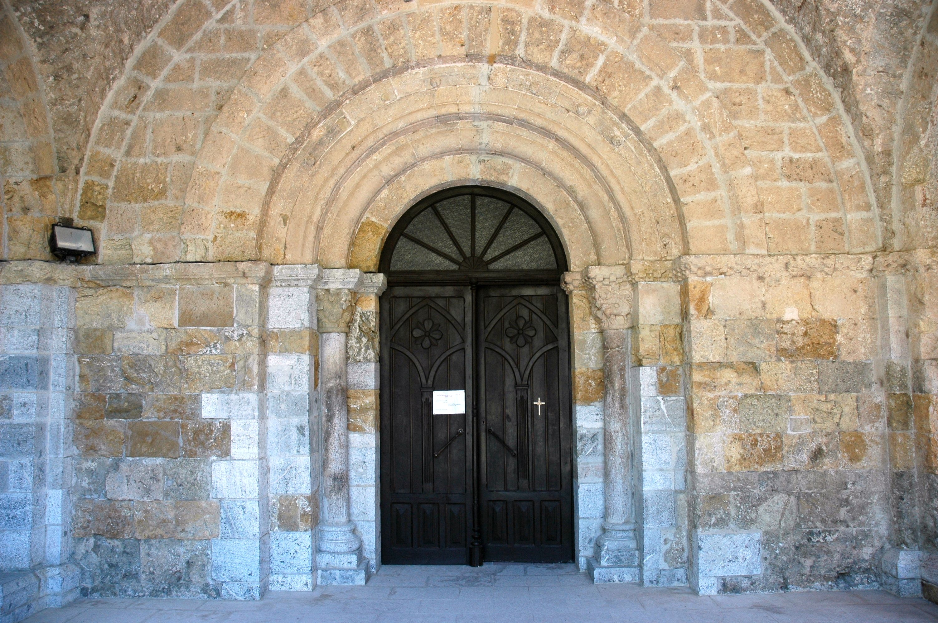 Santa Maria de Gerri - Portalada